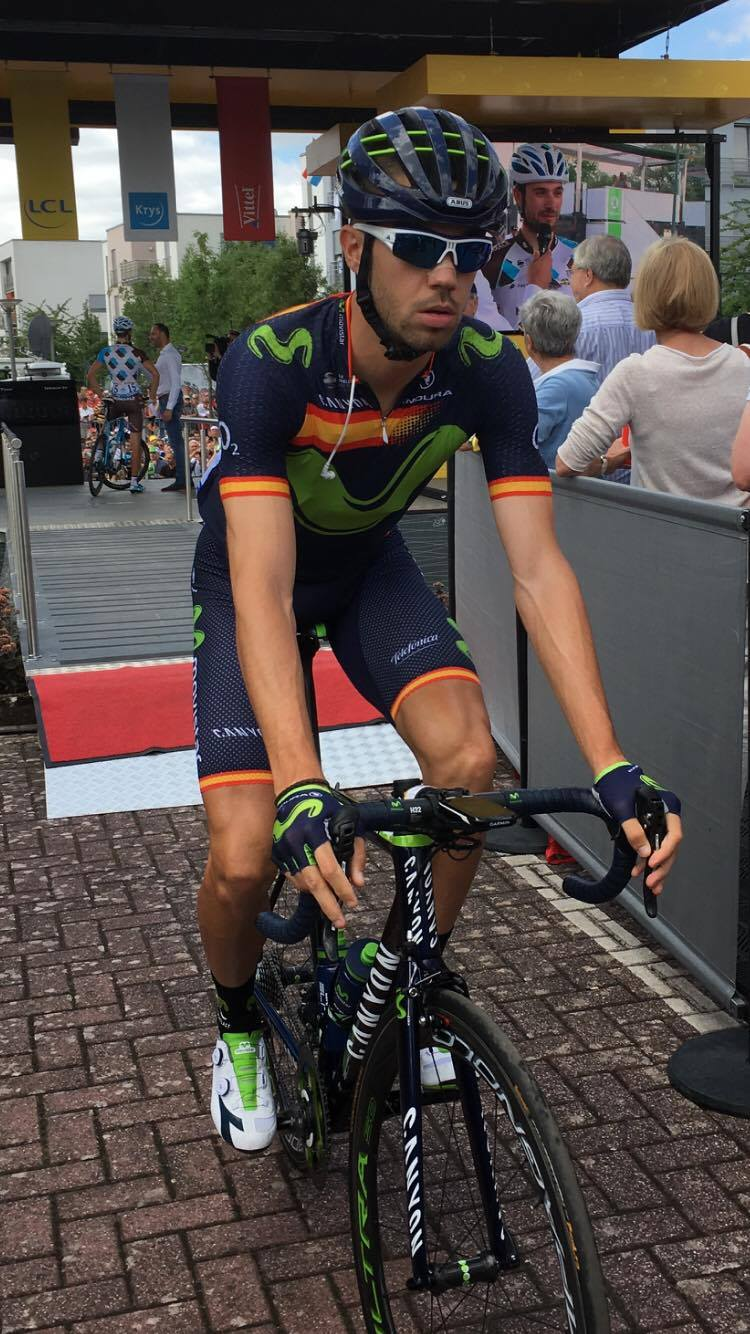 Jesús Herrada (Movistar) au départ de la 4ème étape du Tour de France 2017 à Mondorf-les-Bains (Luxembourg)